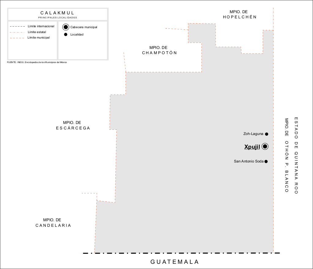 Mapa de las principales localidades del Municipio de Calakmul en el estado de Campeche, México.